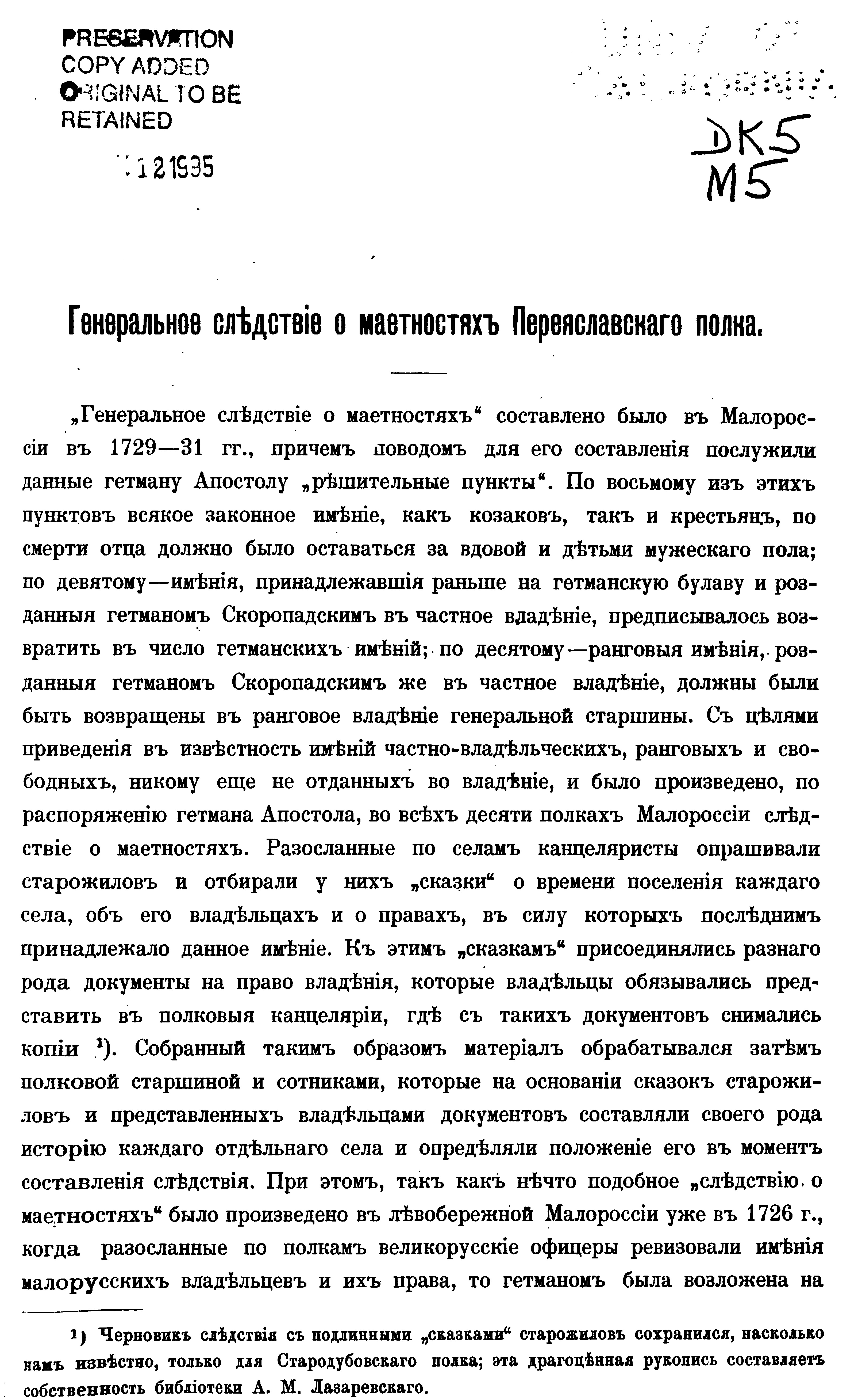 ......рание розданые гетьманом Скоропадским в частные владения ,предписывалось возвратить в частные владения ......